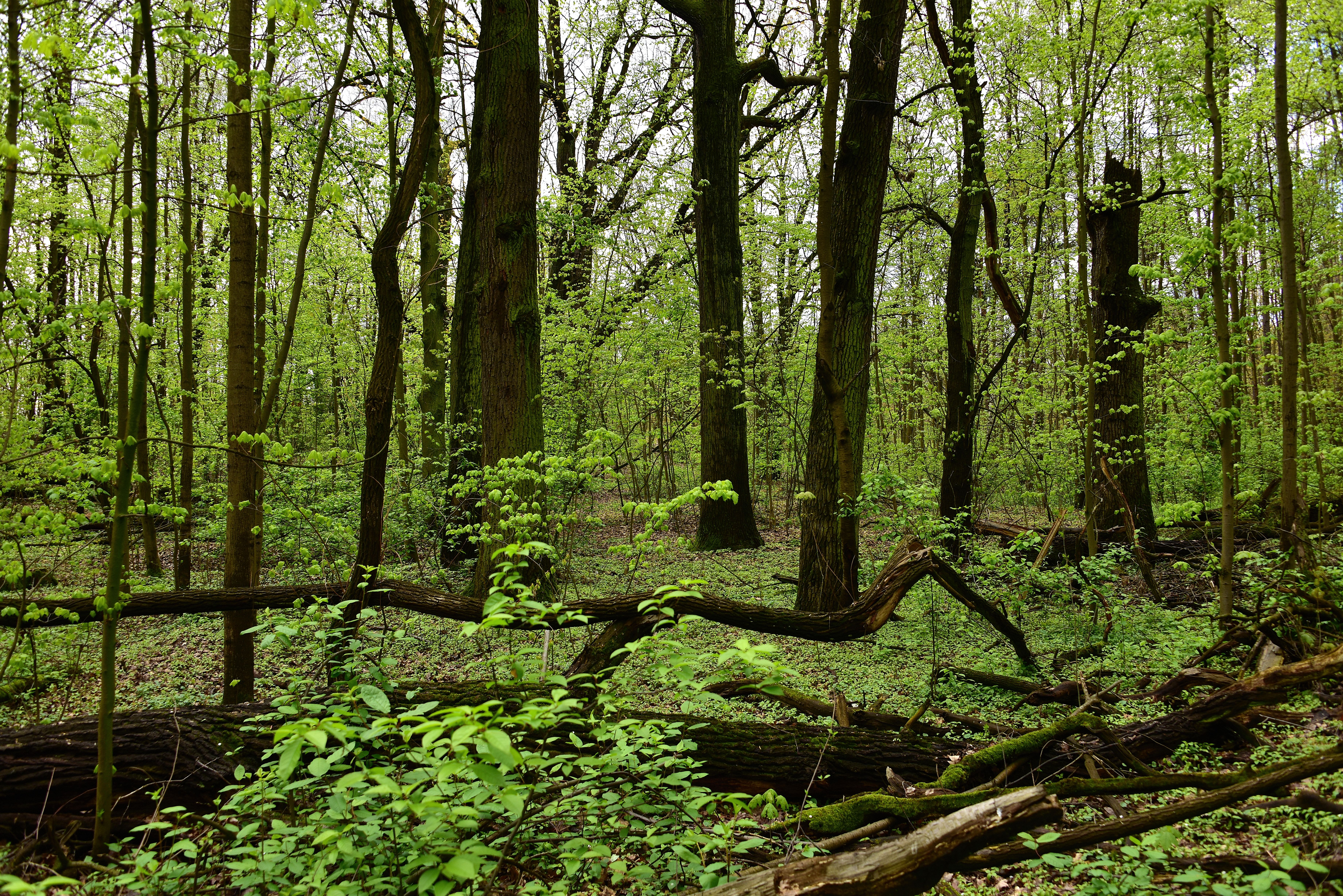 Zespół przyrodniczo-krajobrazowy Dęby Młocińskie w Warszawie